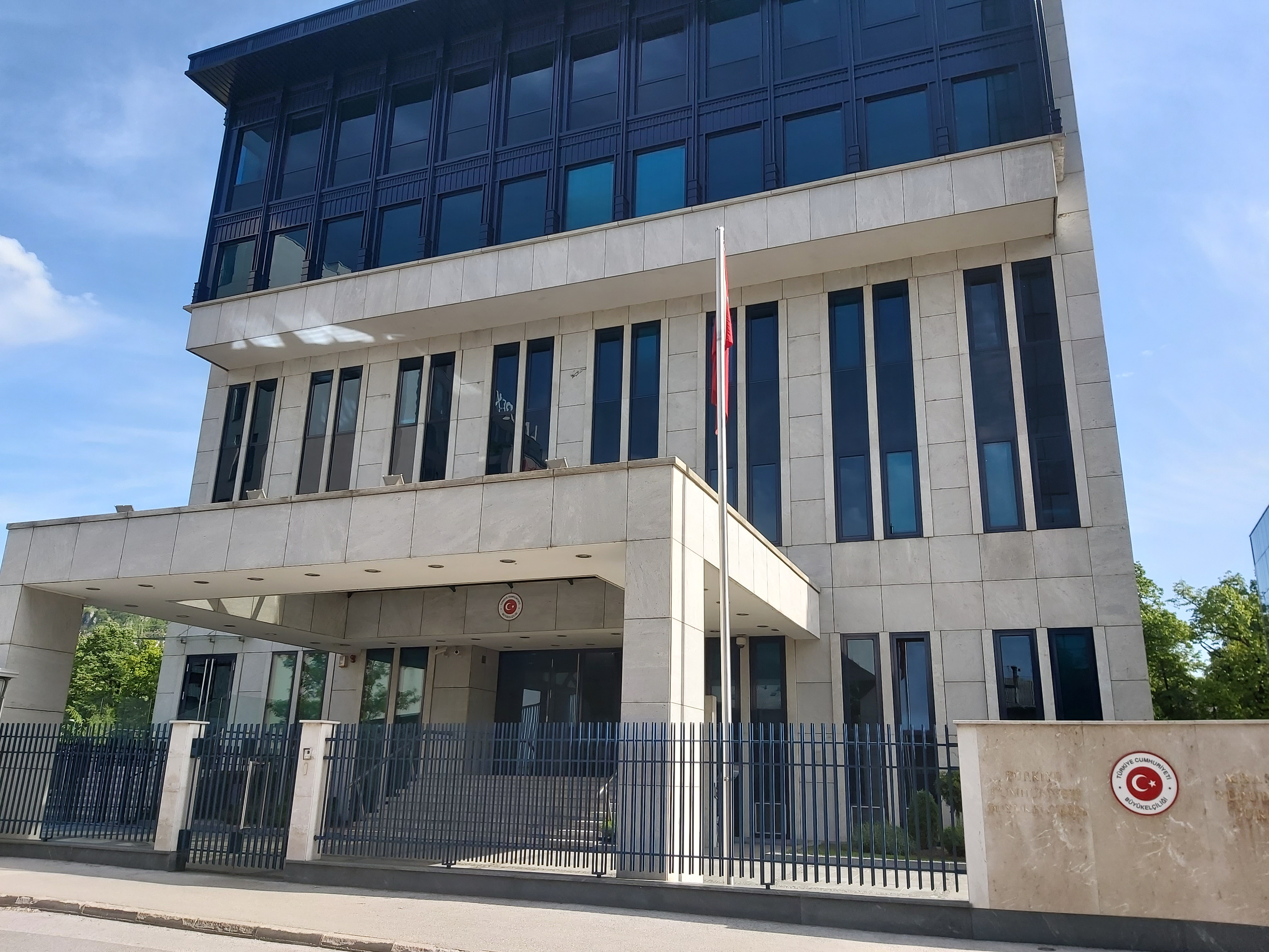 Ambasada Republike Turske u Sarajevu